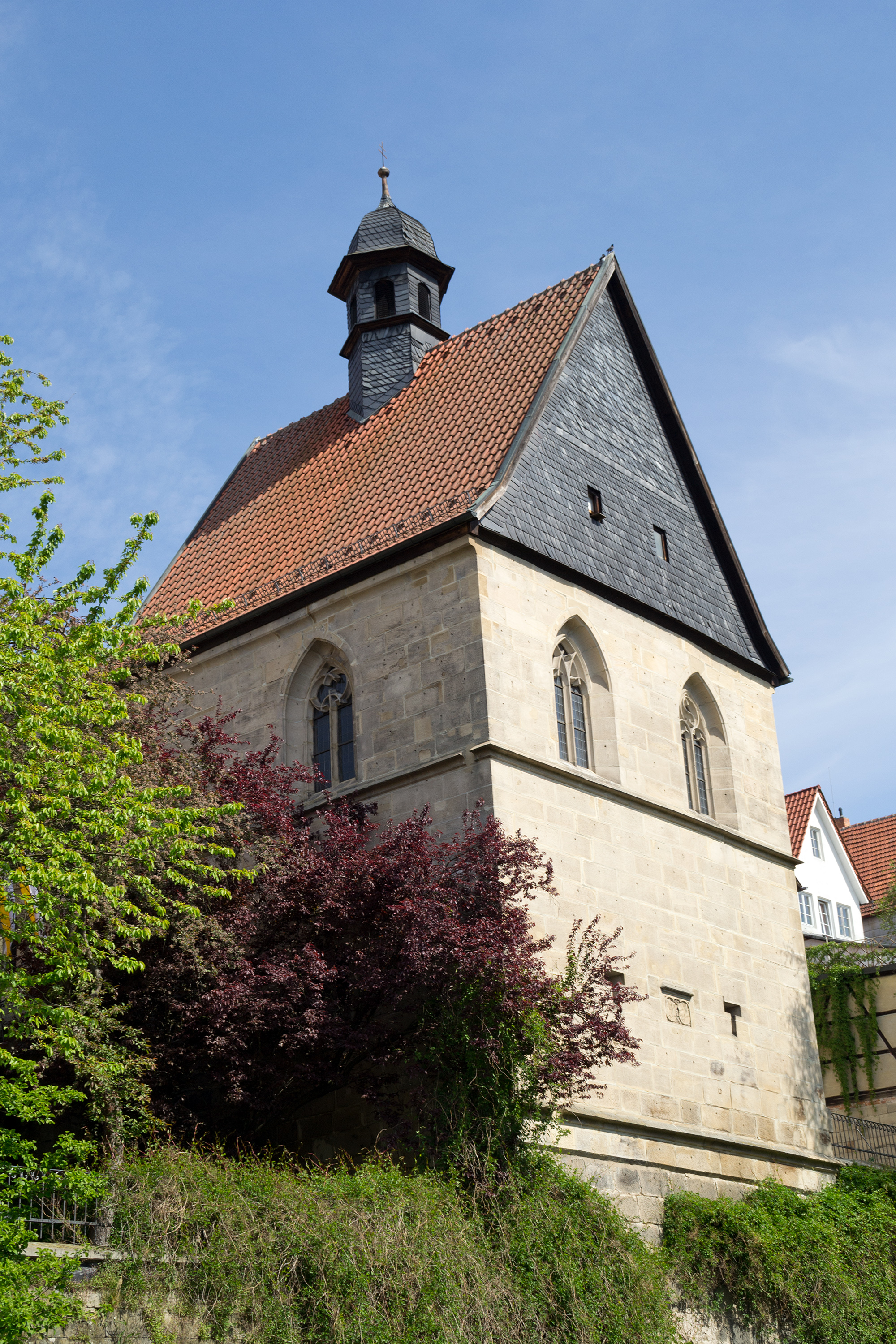 Kath. Annakapelle am Melchior-Otto-Platz 7 in Kronach